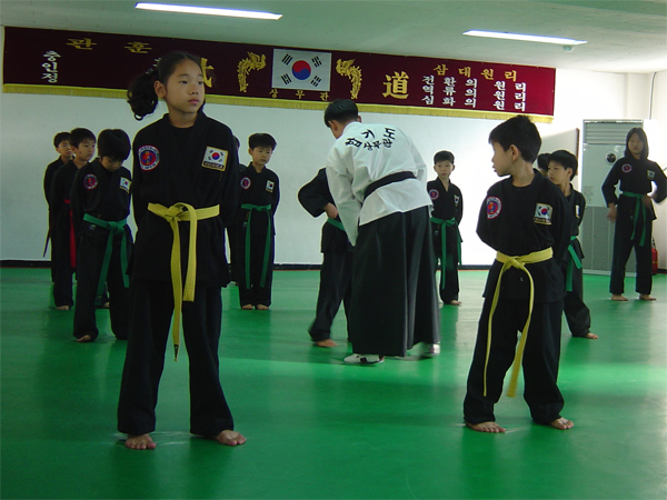 hapkido instructeur inspecteert zijn leerlingen in de dojang